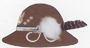 Współczesny kapelusz podhalański WP